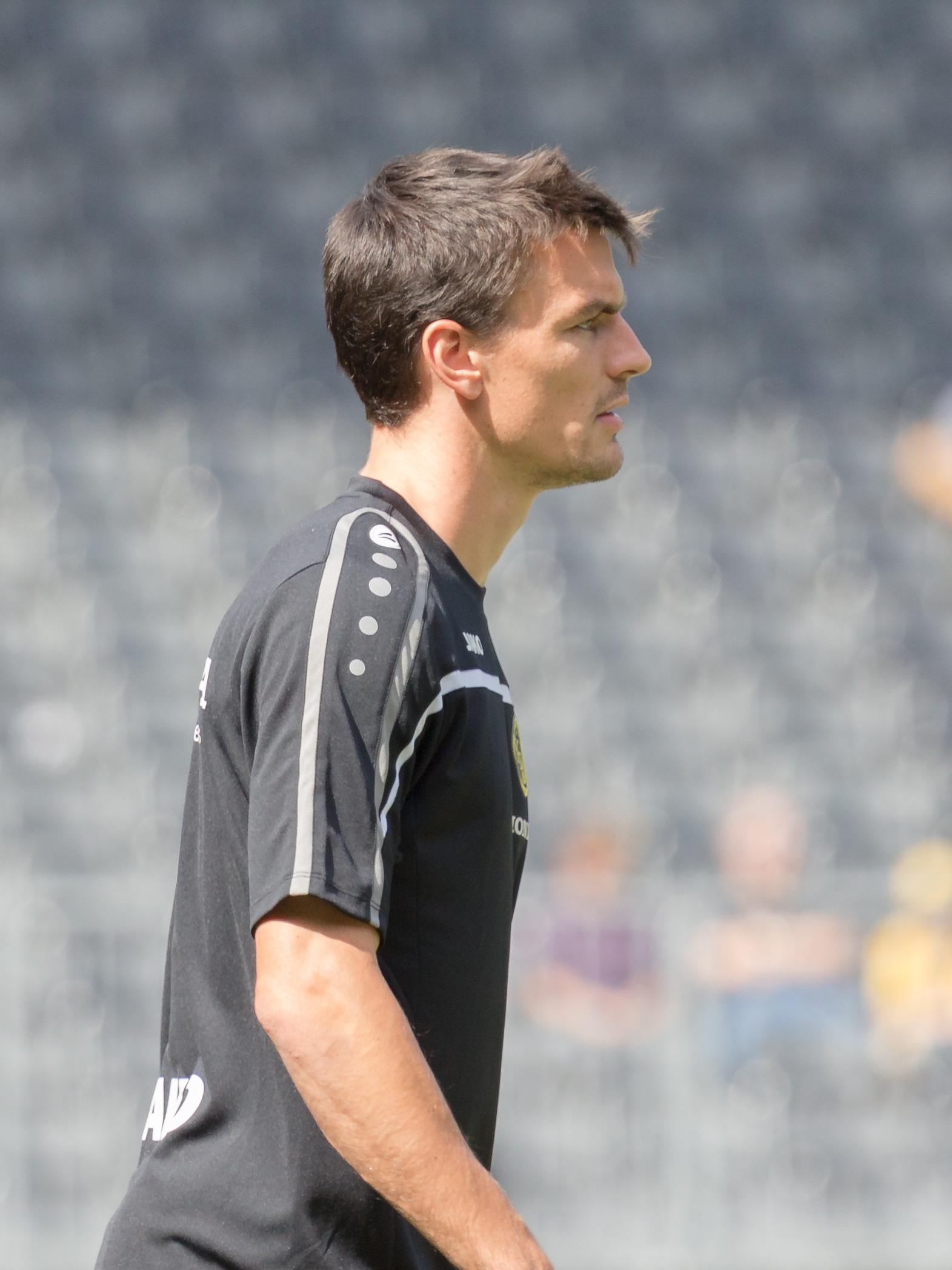 Alain Rochat beim Spiel des BSC Young Boys gegen den FC Luzern